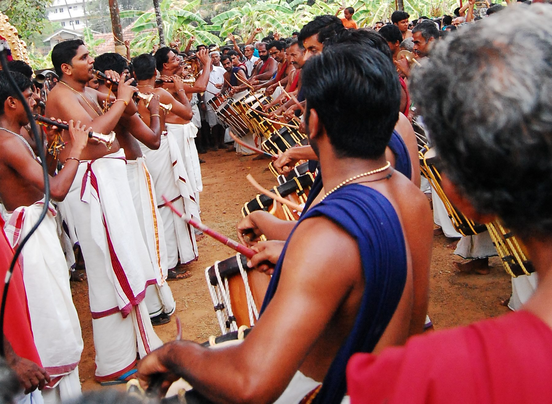 കുഴലും ചെണ്ടയും